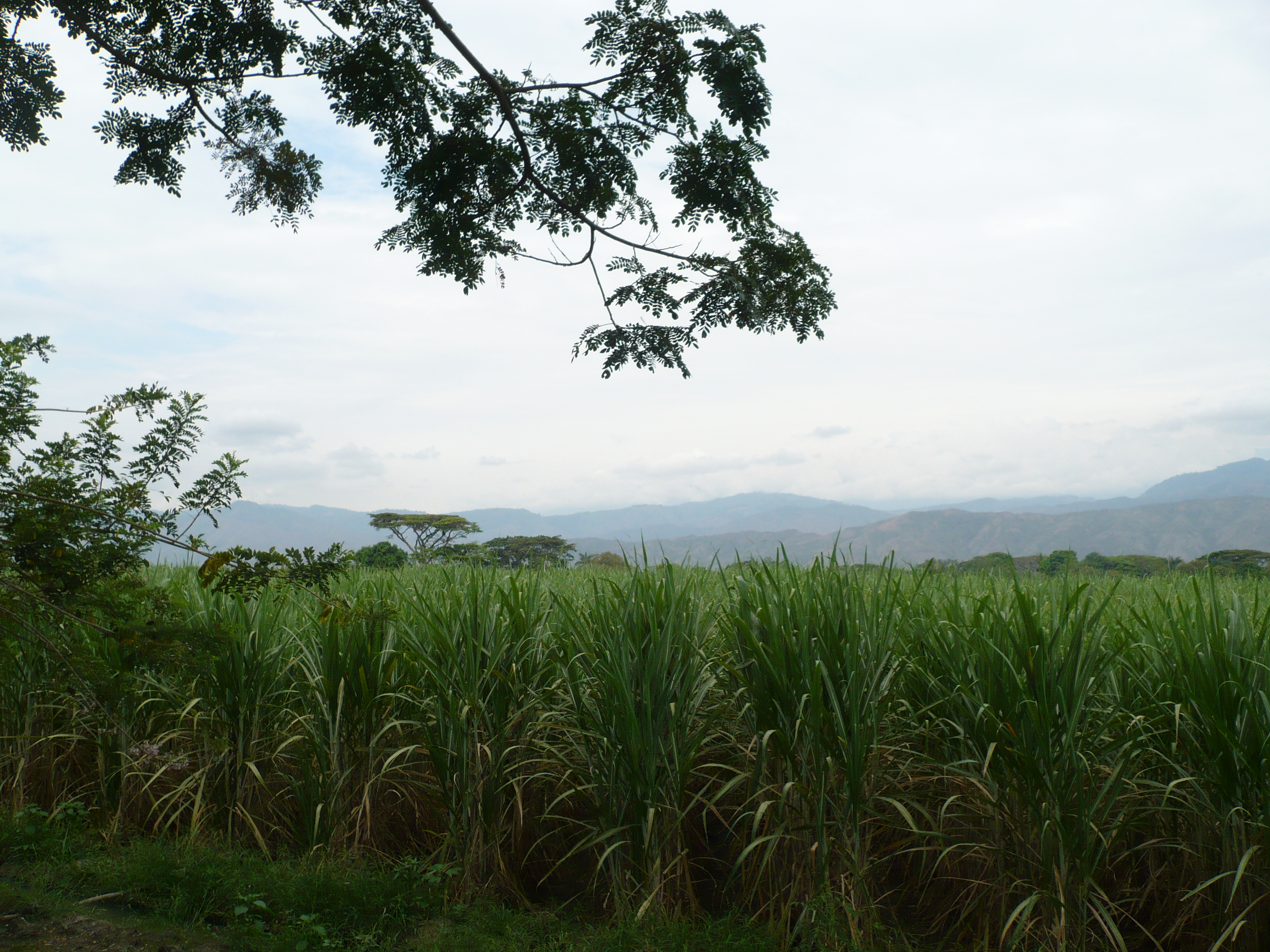 Plantación de caña de azúcar en Guadalajara de Buga, Valle del Cauca. Al fondo la Cordillera Occidental de los Andes en Colombia.